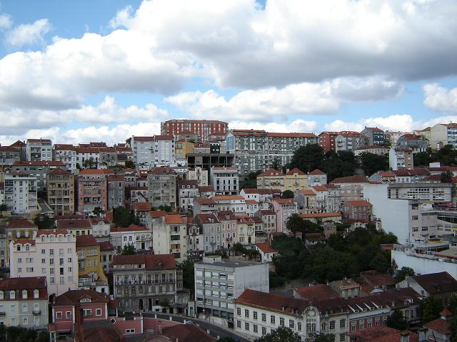 Vista de Coimbra.